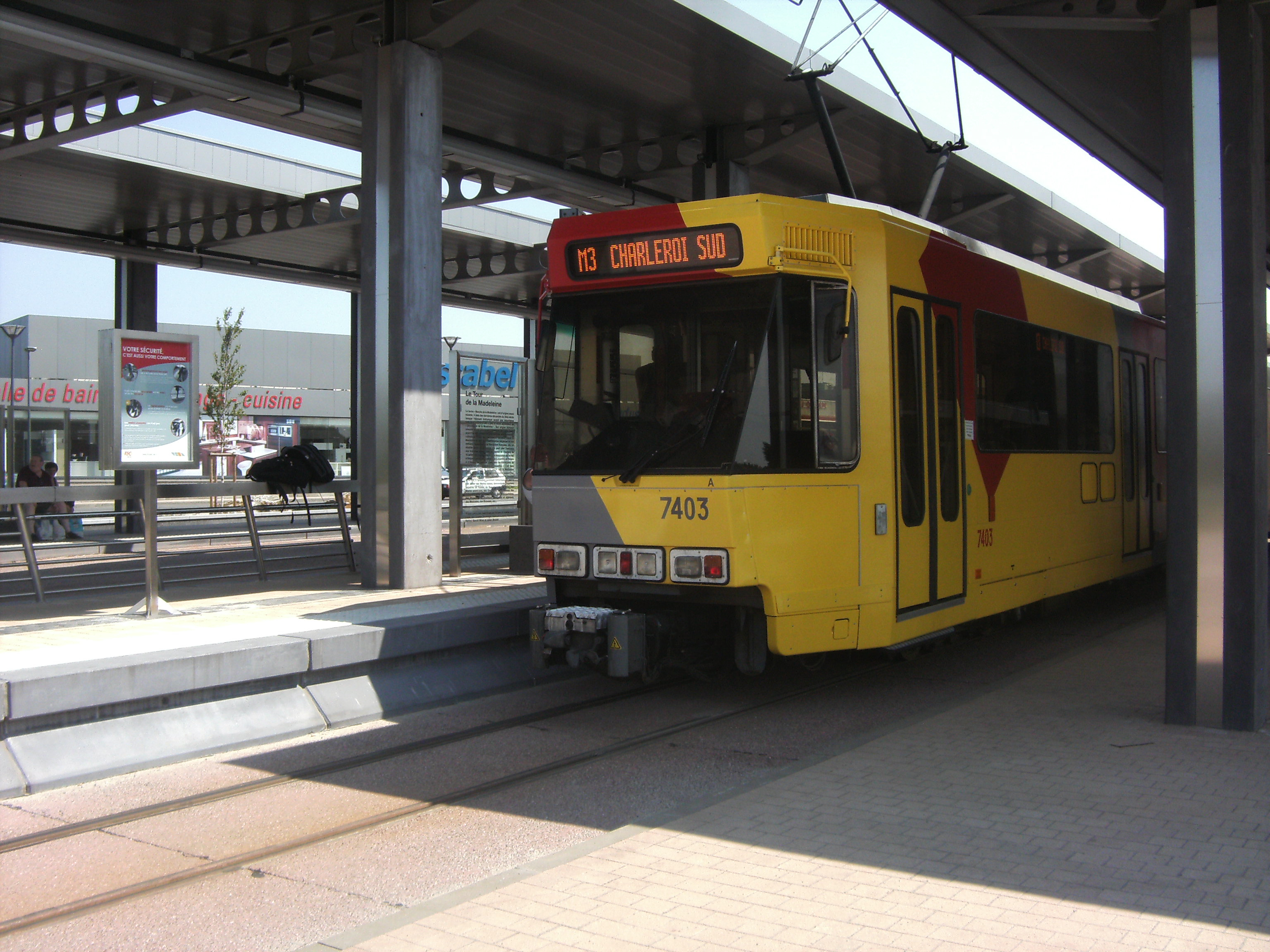 Madeleine metro station (Charleroi)